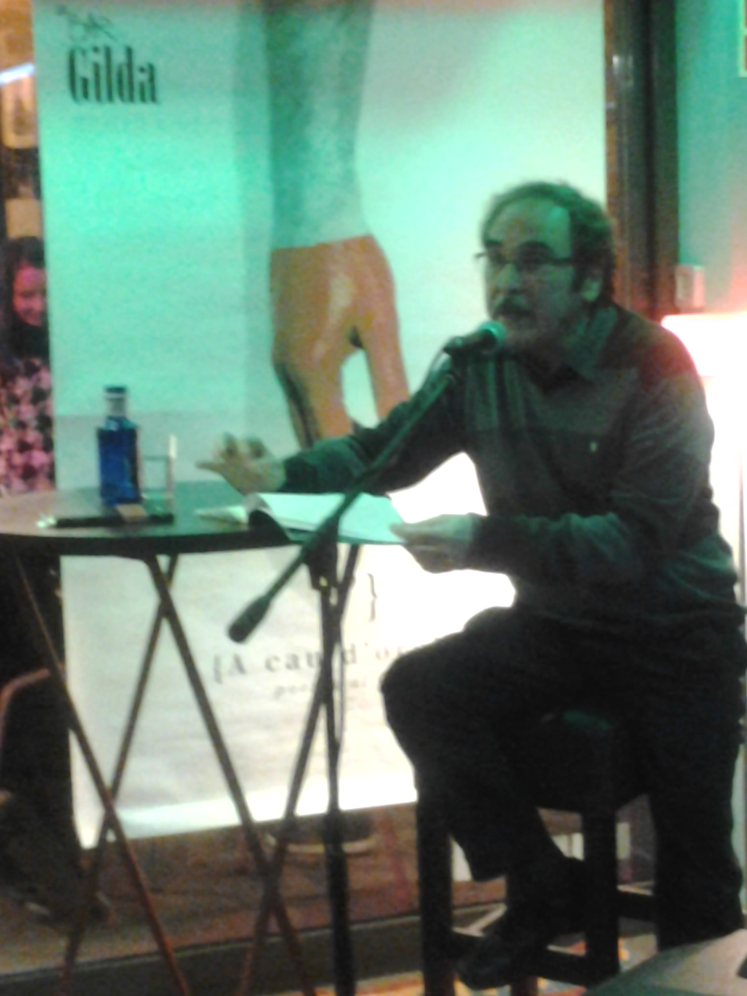 Jaume Pont recitant al 2014